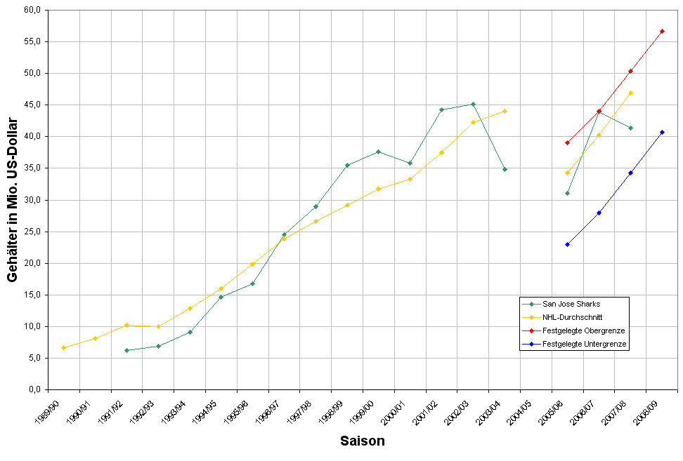 Diagramm mit dem Vergleich der Spielgehälter der Eishockeymannschaft San Jose Sharks mit den durchschnittlichen Gehältern der Eishockeyliga NHL, sowie der maximalen und minimalen Gehaltsgrenze